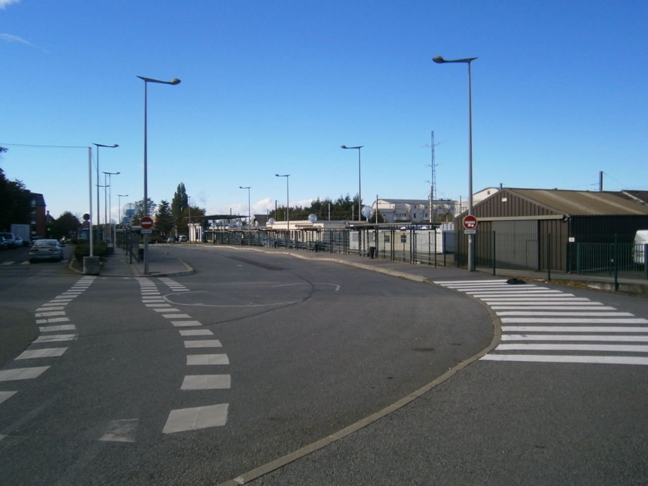 Plaisir (78) : La gare routière.